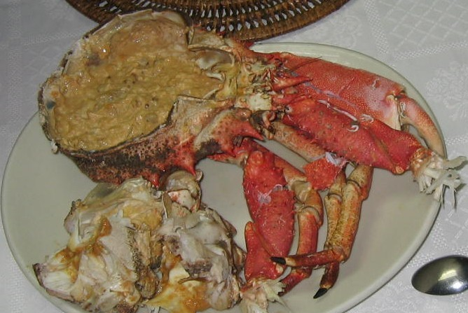 Centollo cocido a la manera tradicional elaborado en la Sociedad Gastronómica El Rinconín, fundada en Oviedo en 1965 (España)